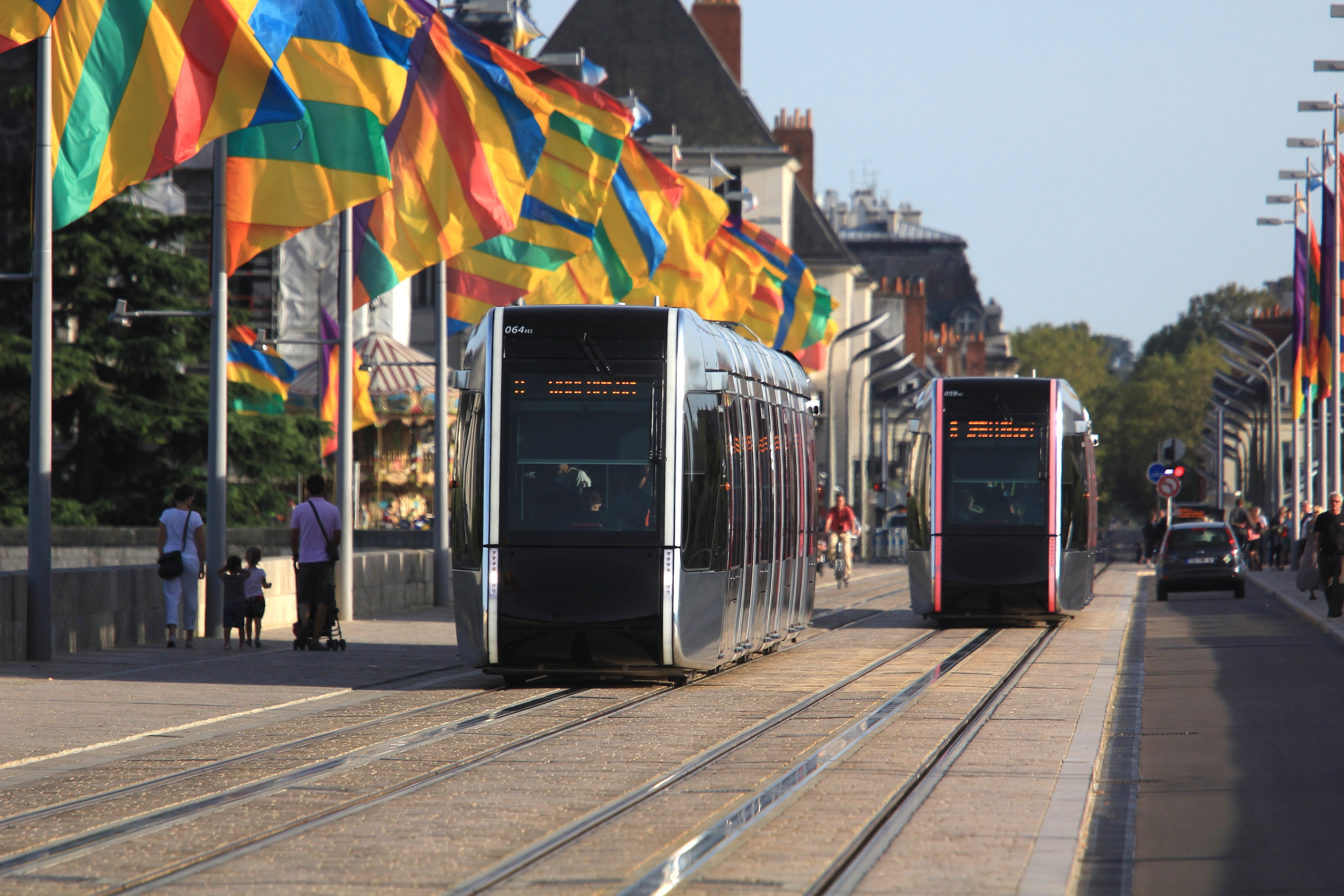 Deux tramways tourangeaux se croisent sur le pont Wilson sur la Loire, à Tours.